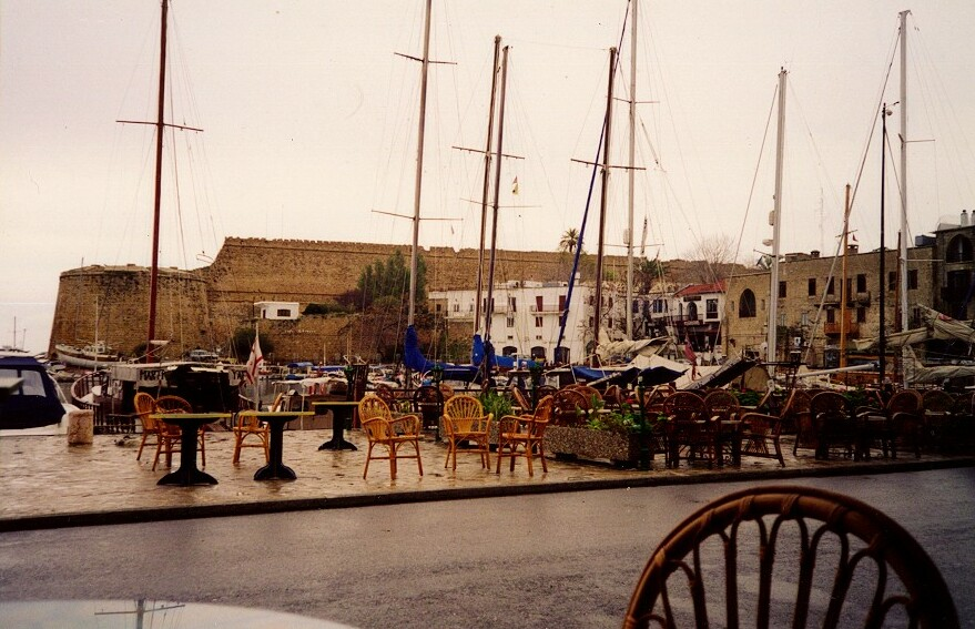 Puerto antiguo de Kyrenia. Nicosia. Chipre. Imagen tomada por el cargador. Año 1998.